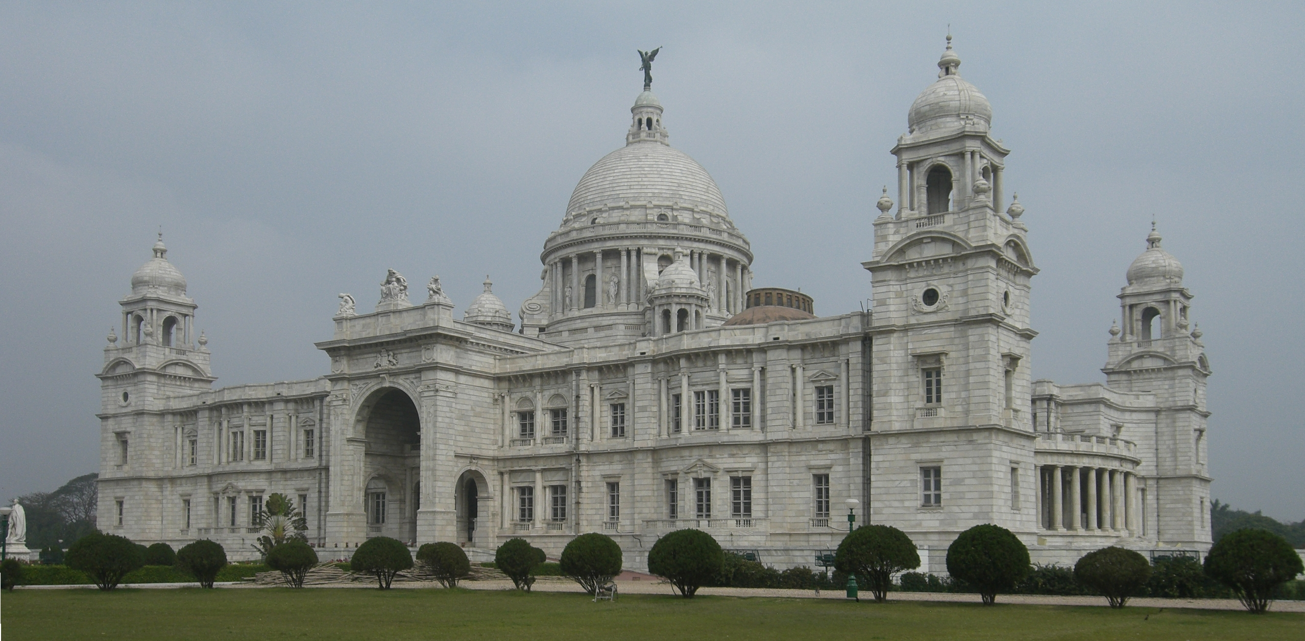 Queen Victoria Memorial, Kolkata